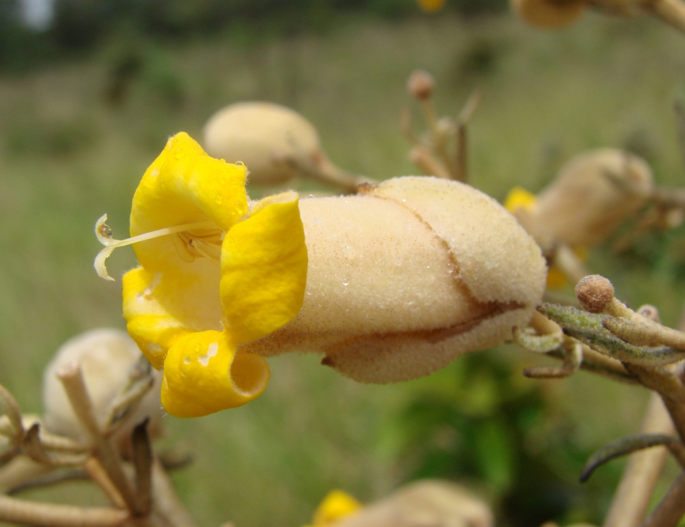 Zeyheria montana - BIGNONIACEAE Campus da Universidade de Brasília (UnB) - Brasília - Distrito Federal - Brasil.